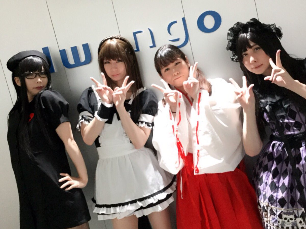 歌舞伎座タワードワンゴニコニコ公式放送にて左から王子、ペシュ、ありすなお、西男歌舞伎座タワー 株式会社ドワンゴ前